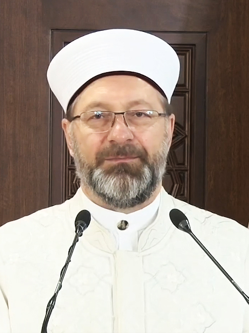 Diyanet İşleri Başkanı Ali Erbaş